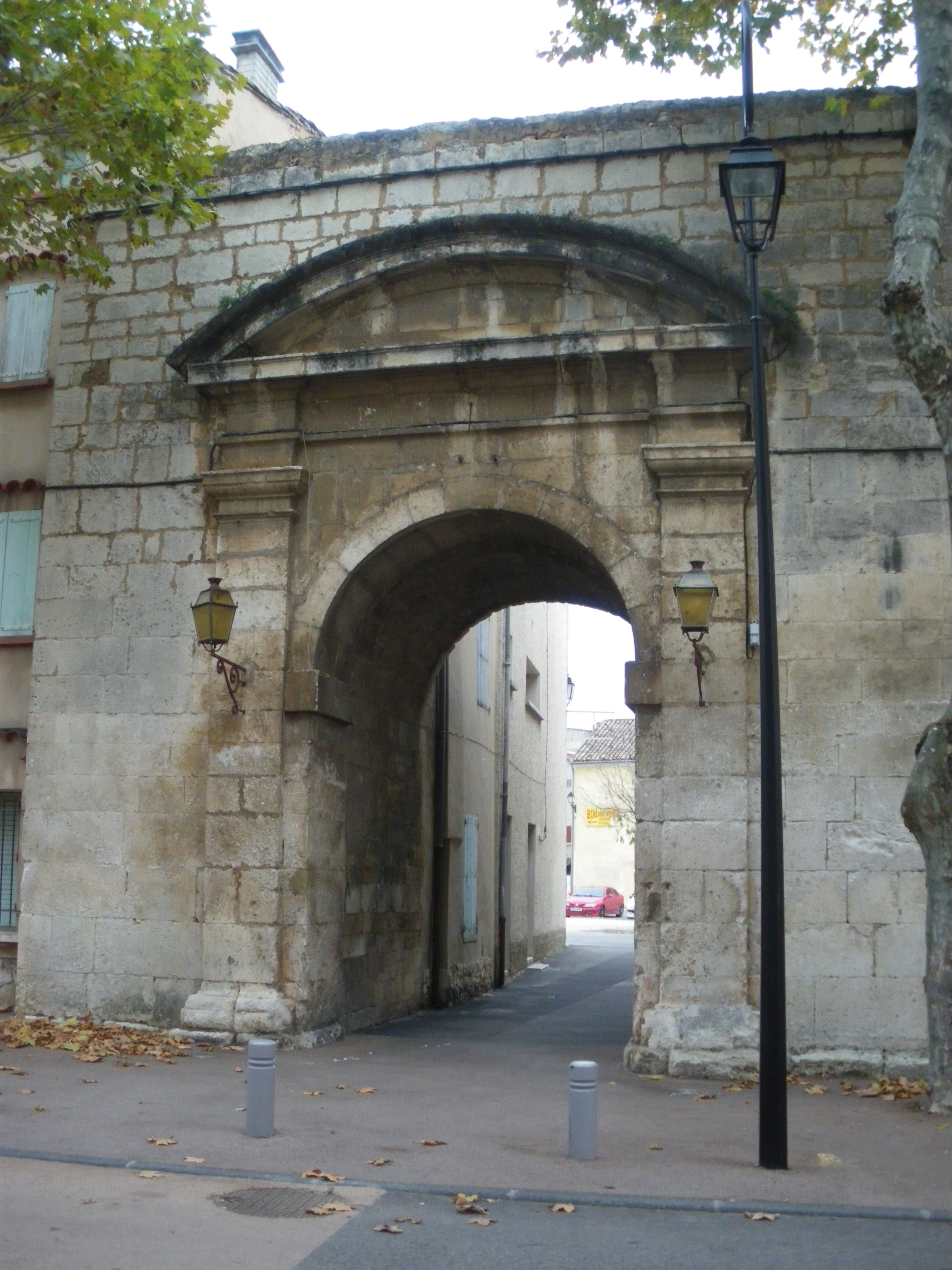 Ancienne porte de Villes sur Auzon, Vaucluse, France